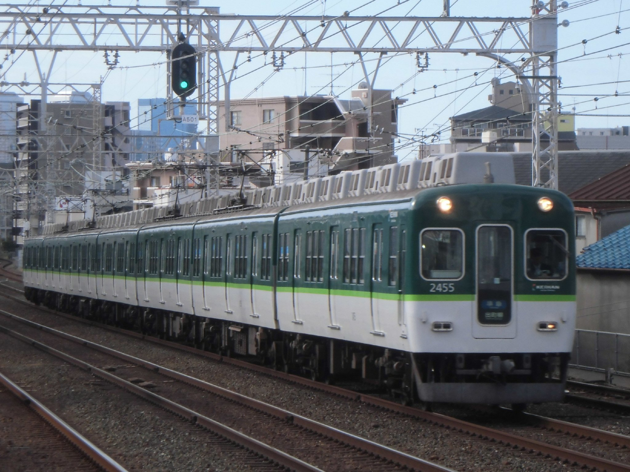 京阪2400系2455F